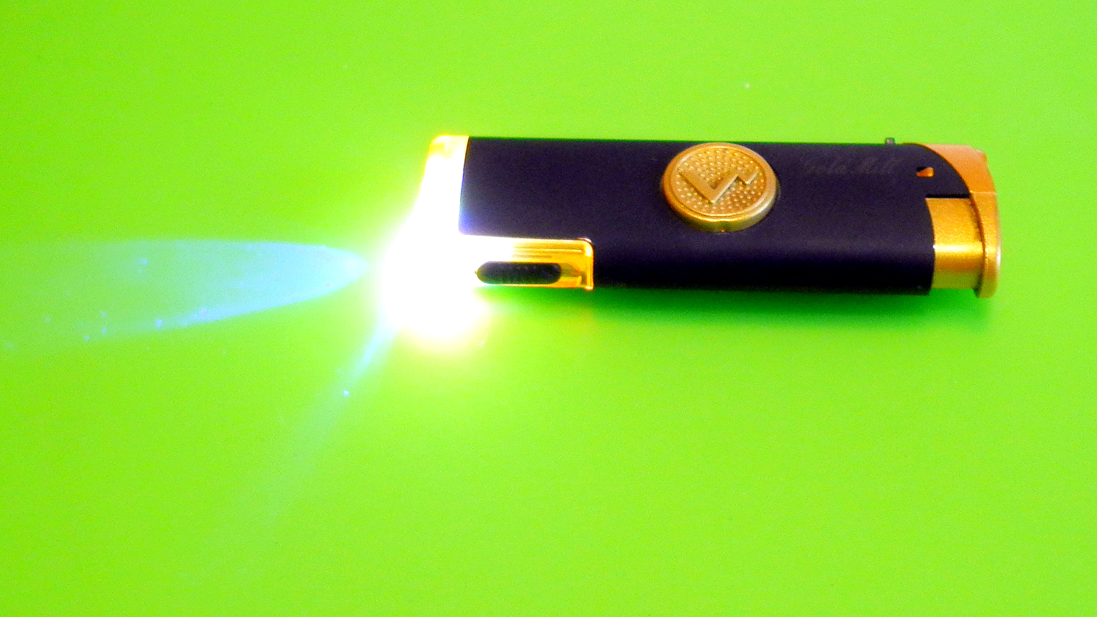 Мультиспиннер (спиннер, зажигалка и мультицветный фонарик)